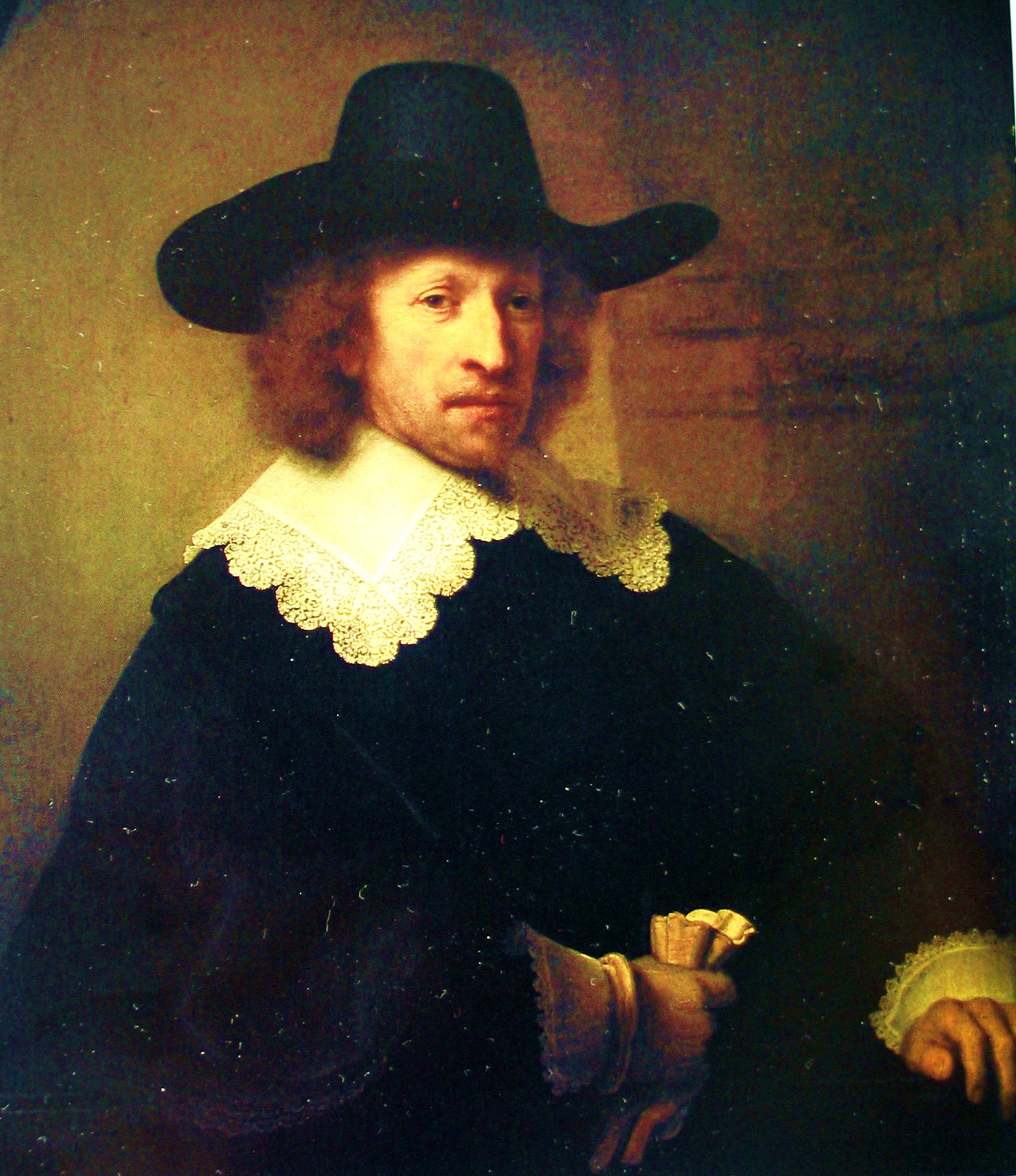 The merchant Nicolaes van Bambeeck (1596-1661)label QS:Len,"The merchant Nicolaes van Bambeeck (1596-1661)" label QS:Lnl,"De koopman Nicolaes van Bambeeck (1596-1661) op 44-jarige leeftijd,"